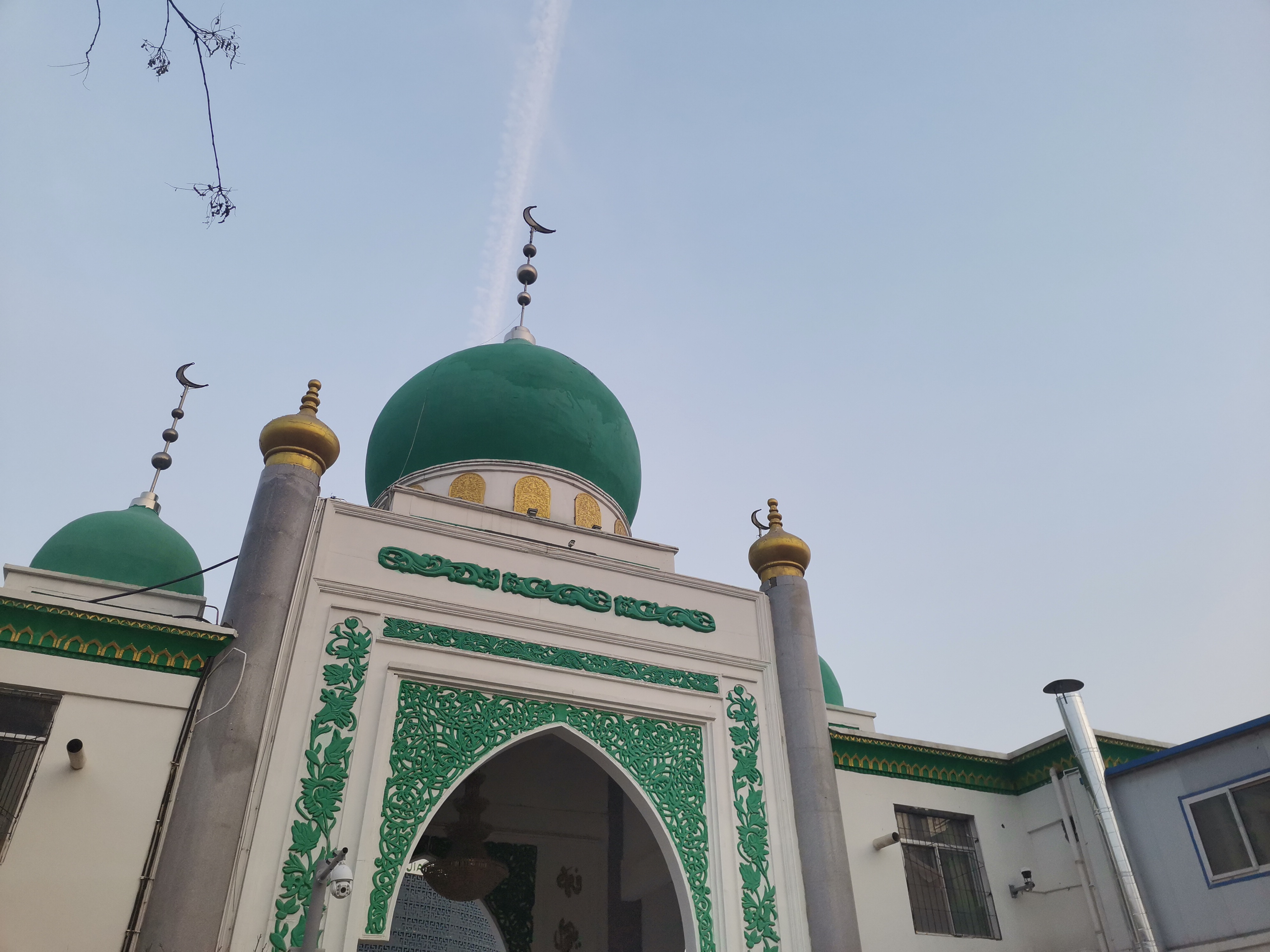 宁夏银川南关清真大寺的大门，摄于2020年1月